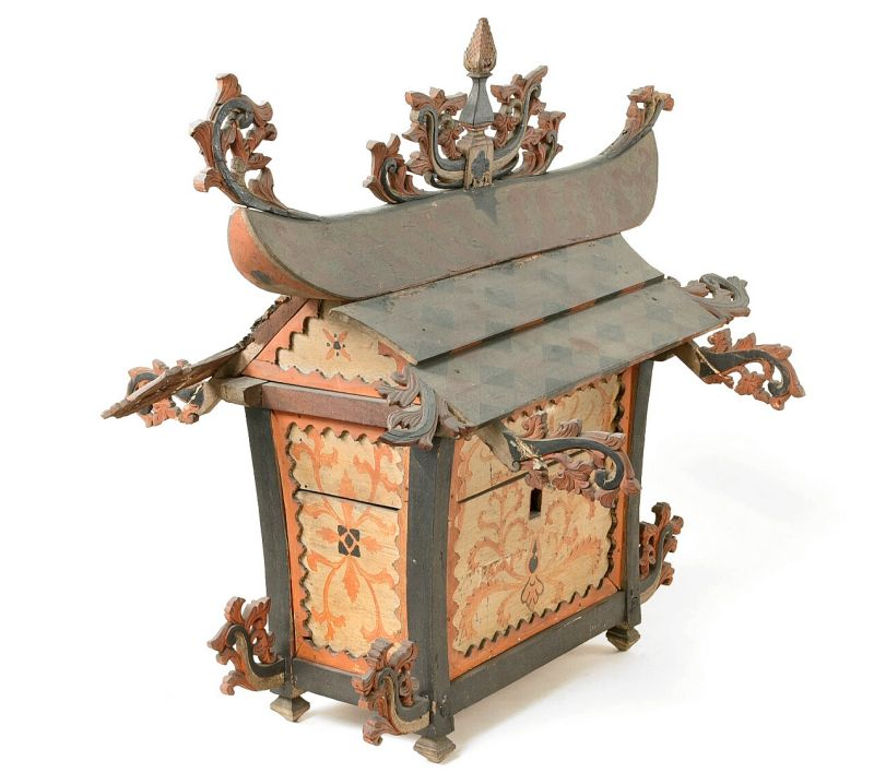 Huismodel. Huisje waarin de beenderen uit geruimde graven worden opgeborgen.. Model van een knekelhuis Unknown language: Sandung